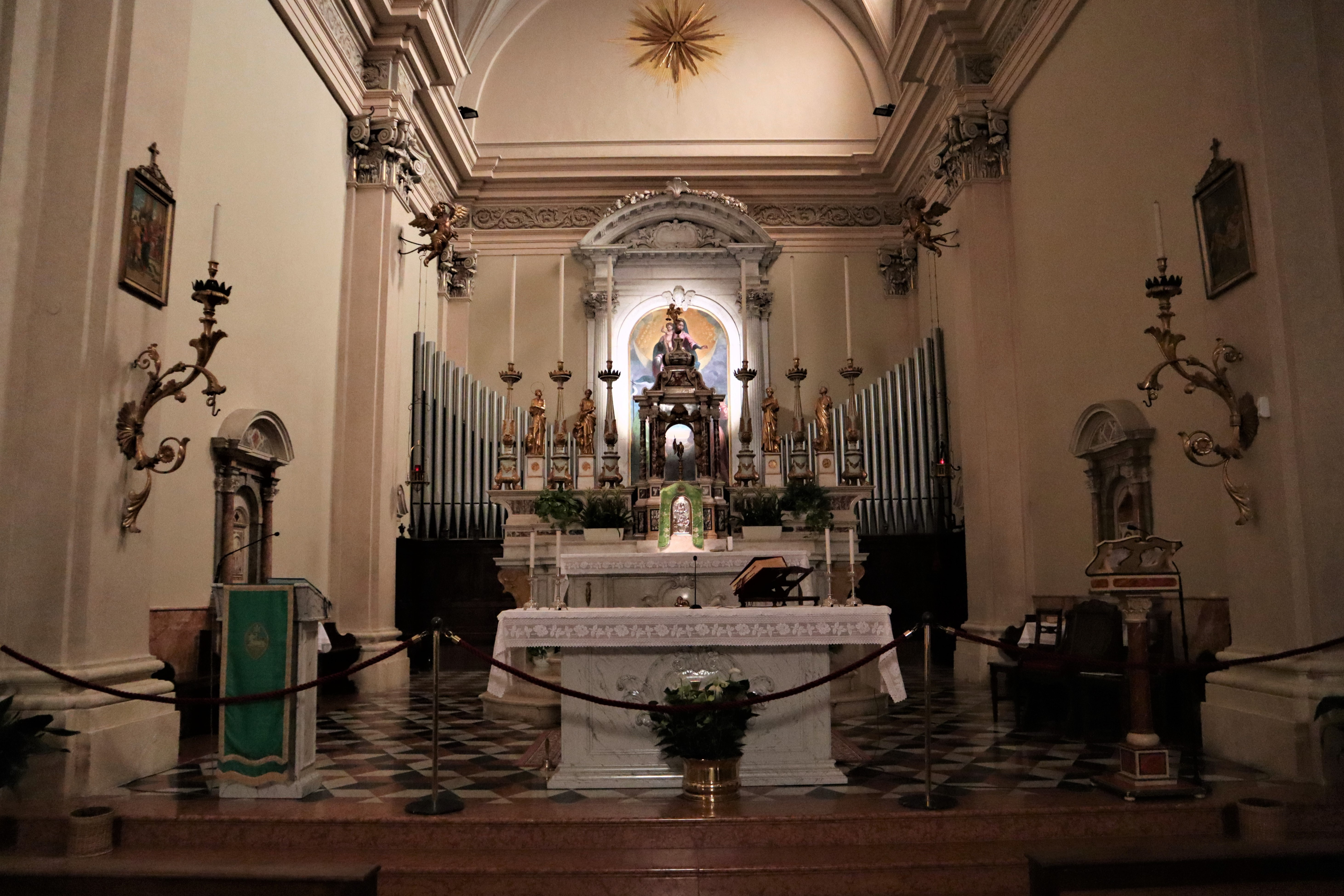 Chiesa di San Giovanni Battista. Interno.